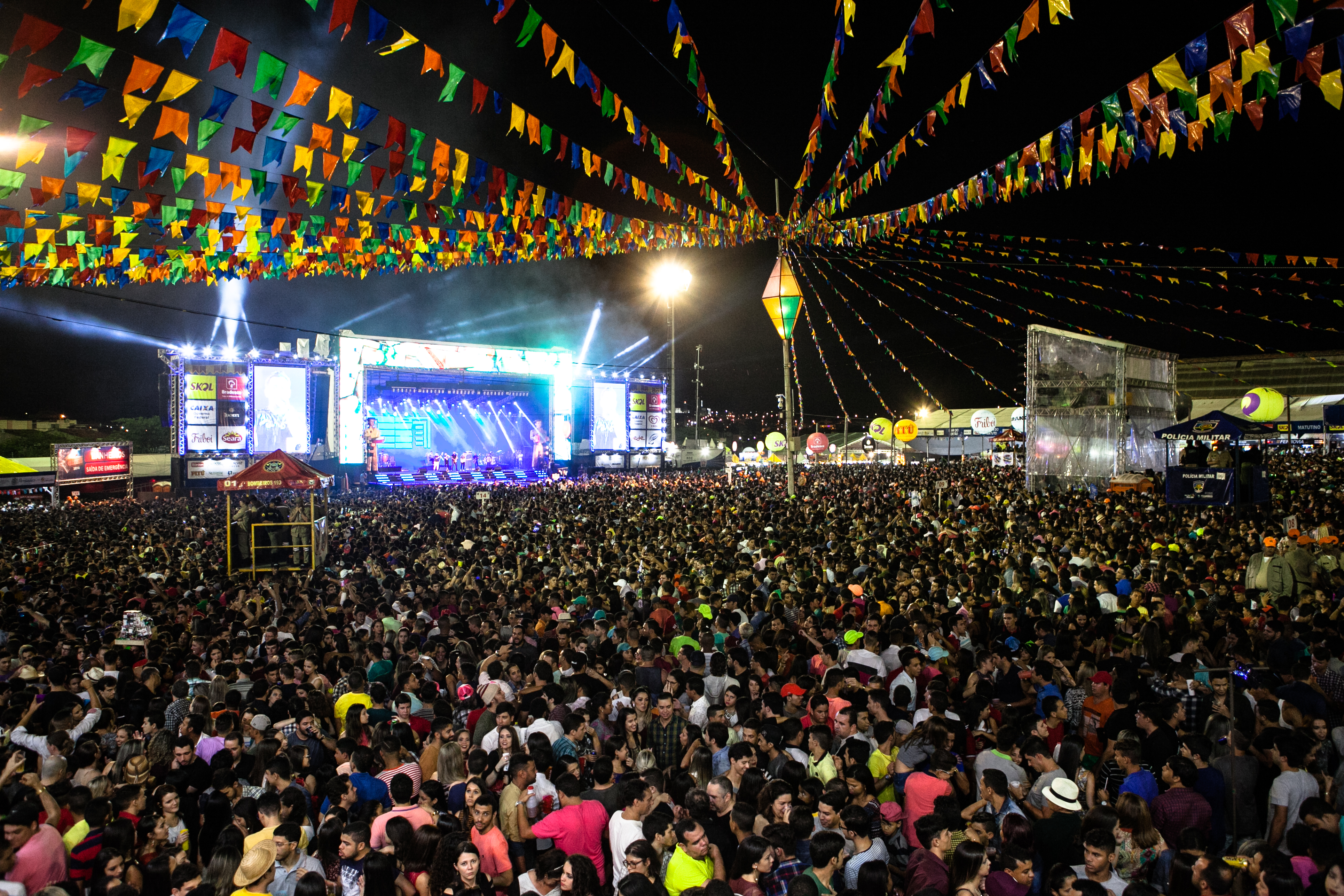 18-06-2016 Ministro da Cultura, Marcelo Calero, conhece o São João de Caruaru. Fotos: Janine Moraes/MinC